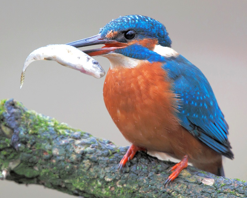 Eisvogel mit erbeutetem Fisch.